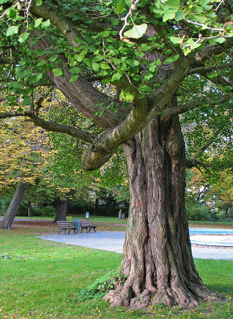 Beschreibung: Ginkgo biloba - Stamm Fotograf: Darkone, 24. Oktober 2005